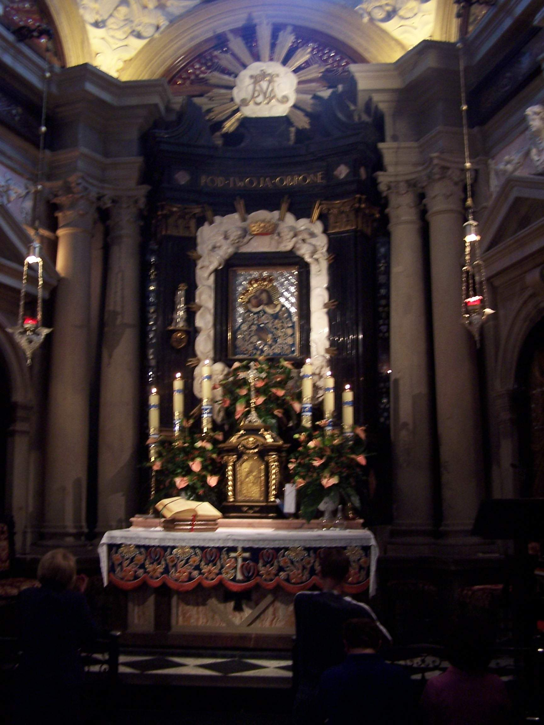 Photo by Piotrus. Matka boska kalwaryjska. Our Lady of Calvary.